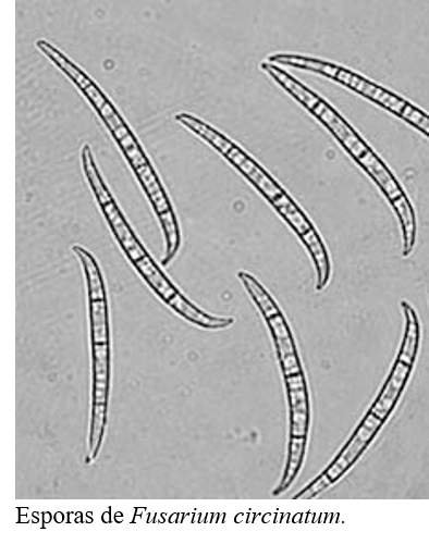 Esporas de Fusarium circinatum